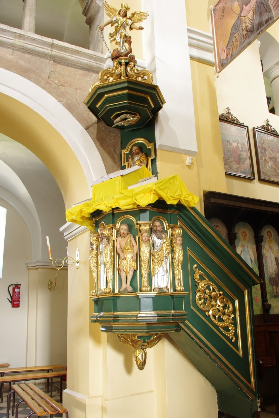 Kościół pw. św. Wojciecha- ambona